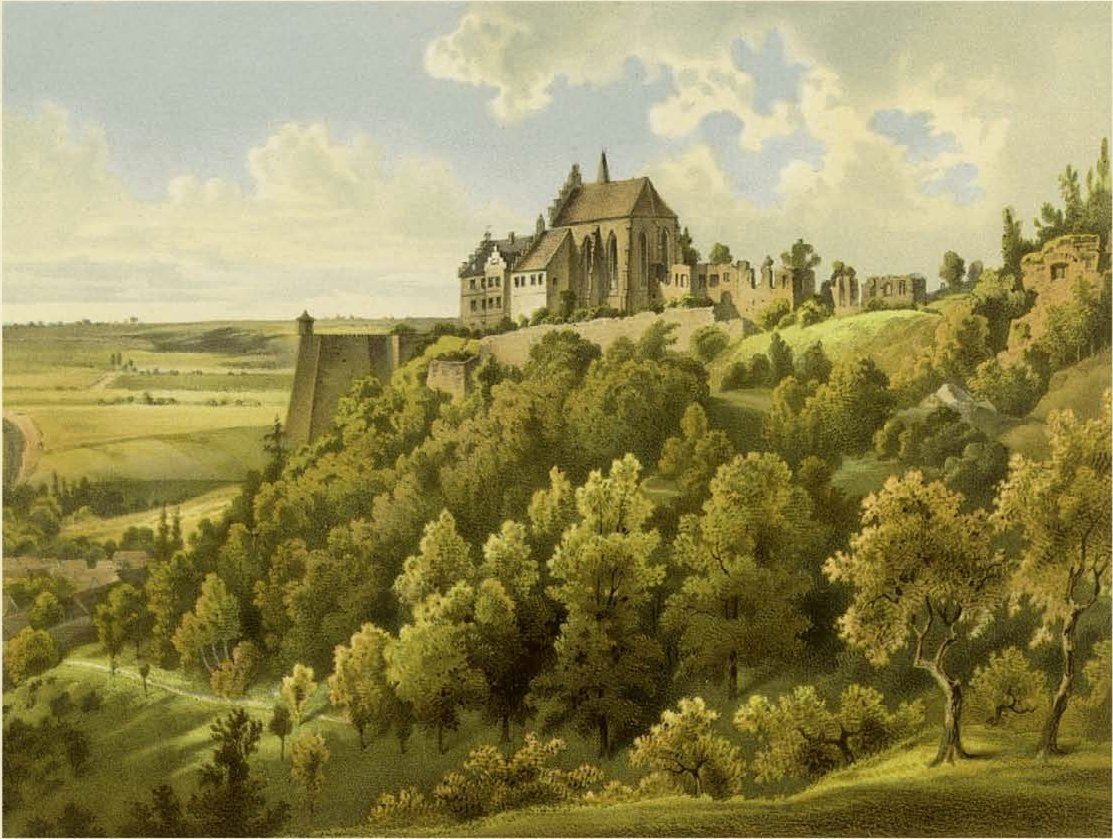 Schloss Mansfeld - Lithographie aus Alexander Duncker: Die ländlichen Wohnsitze, Schlösser und Residenzen der ritterschaftlichen Grundbesitzer in der preußischen Monarchie nebst den Königlichen Familien-, Haus-Fideikomiss- und Schatullgütern in naturgetreuen, künstlerisch ausgeführten, farbigen Darstellungen nebst begleitendem Text. Berlin: Duncker 1857-1883